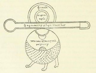 Appareil à kérotakis, manuscrit Marcianus graecus 299, folio 195v